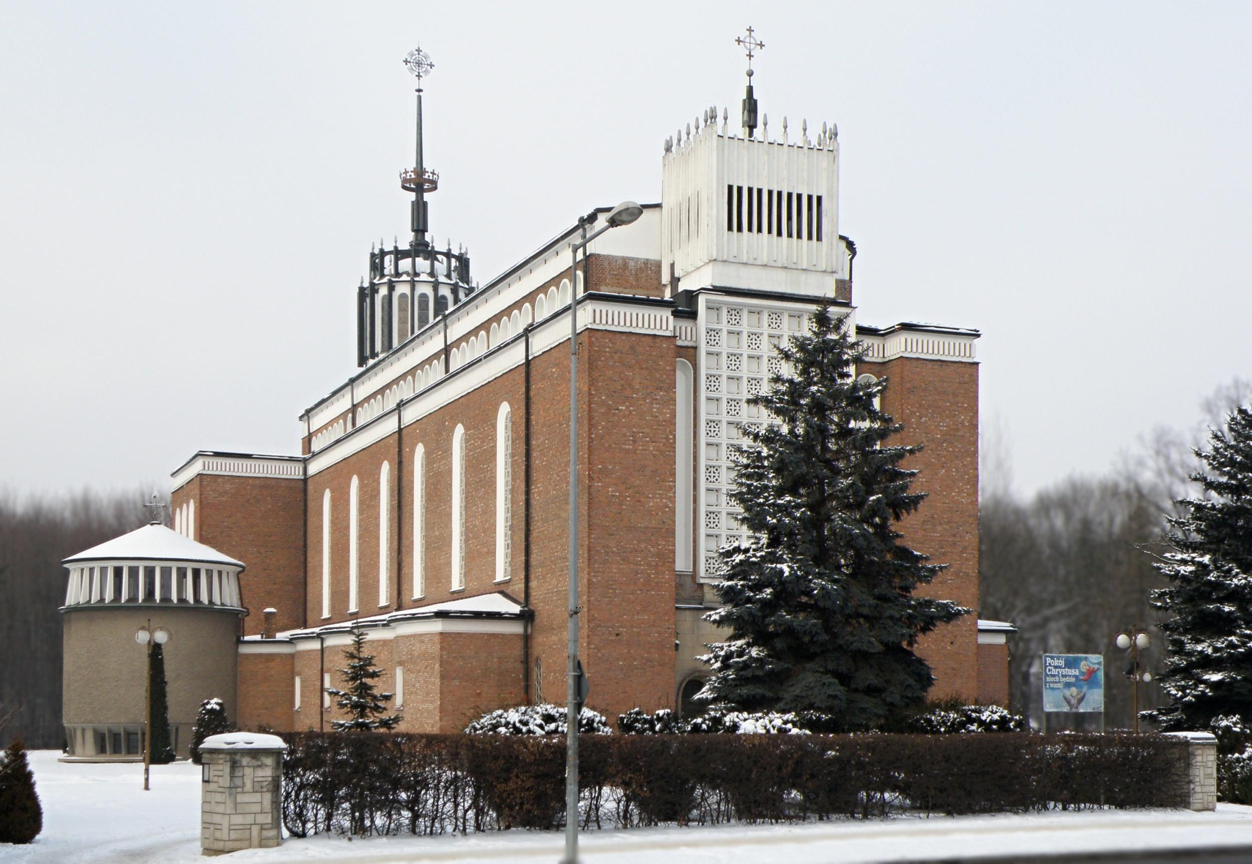 Tarnów, ul. Zbylitowska 5 - kościół parafialny pw. Najświętszej Maryi Panny Królowej Polski